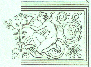 Brüstungsdetail am Feilnerhaus in Berlin